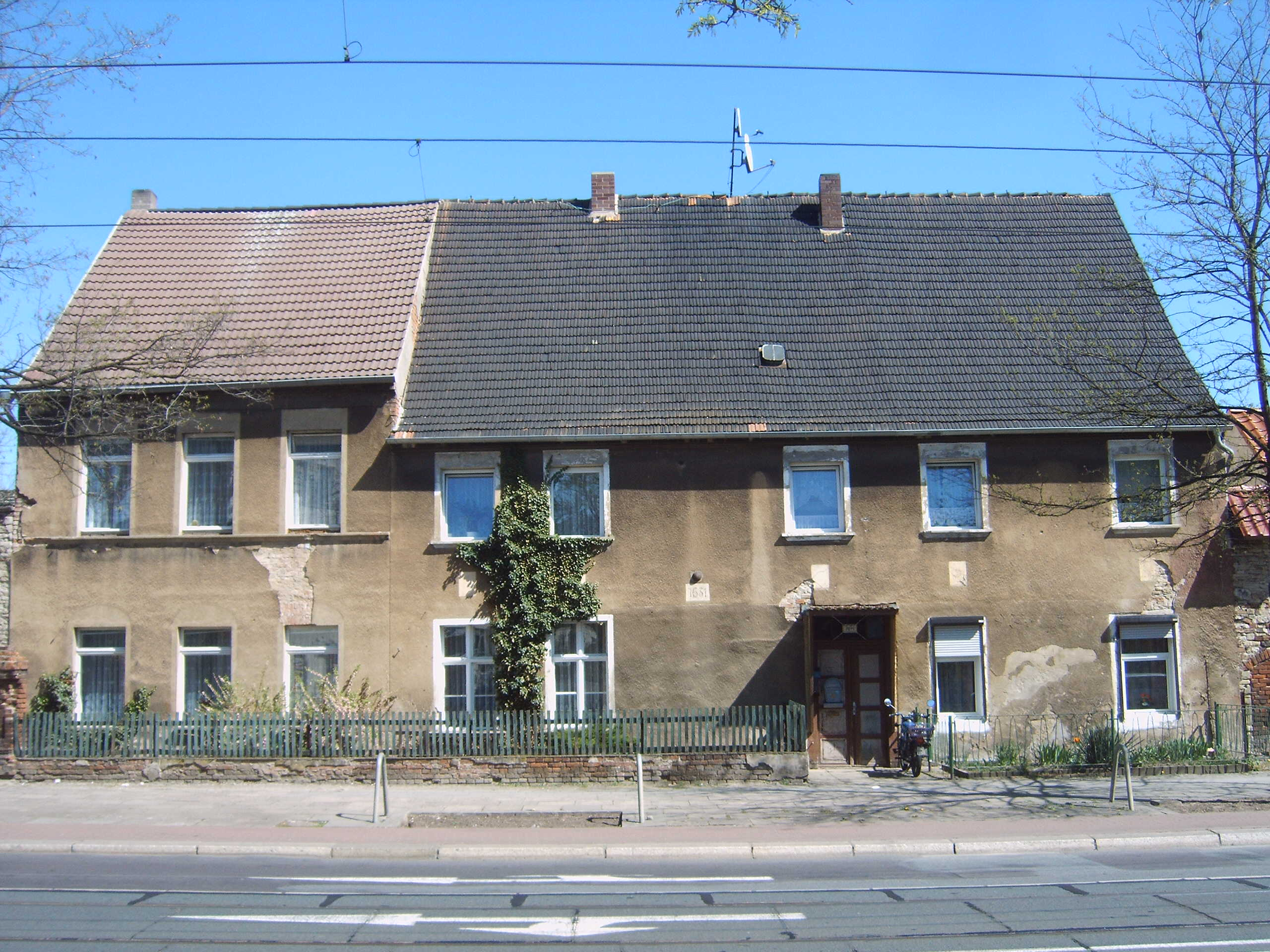 Weibezahlscher Hof (Alt Westerhüsen Nr. 153) in Magdeburg-Westerhüsen